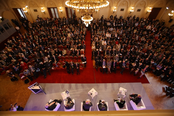 Konference Forum 2000, palác Žofín, říjen 2011